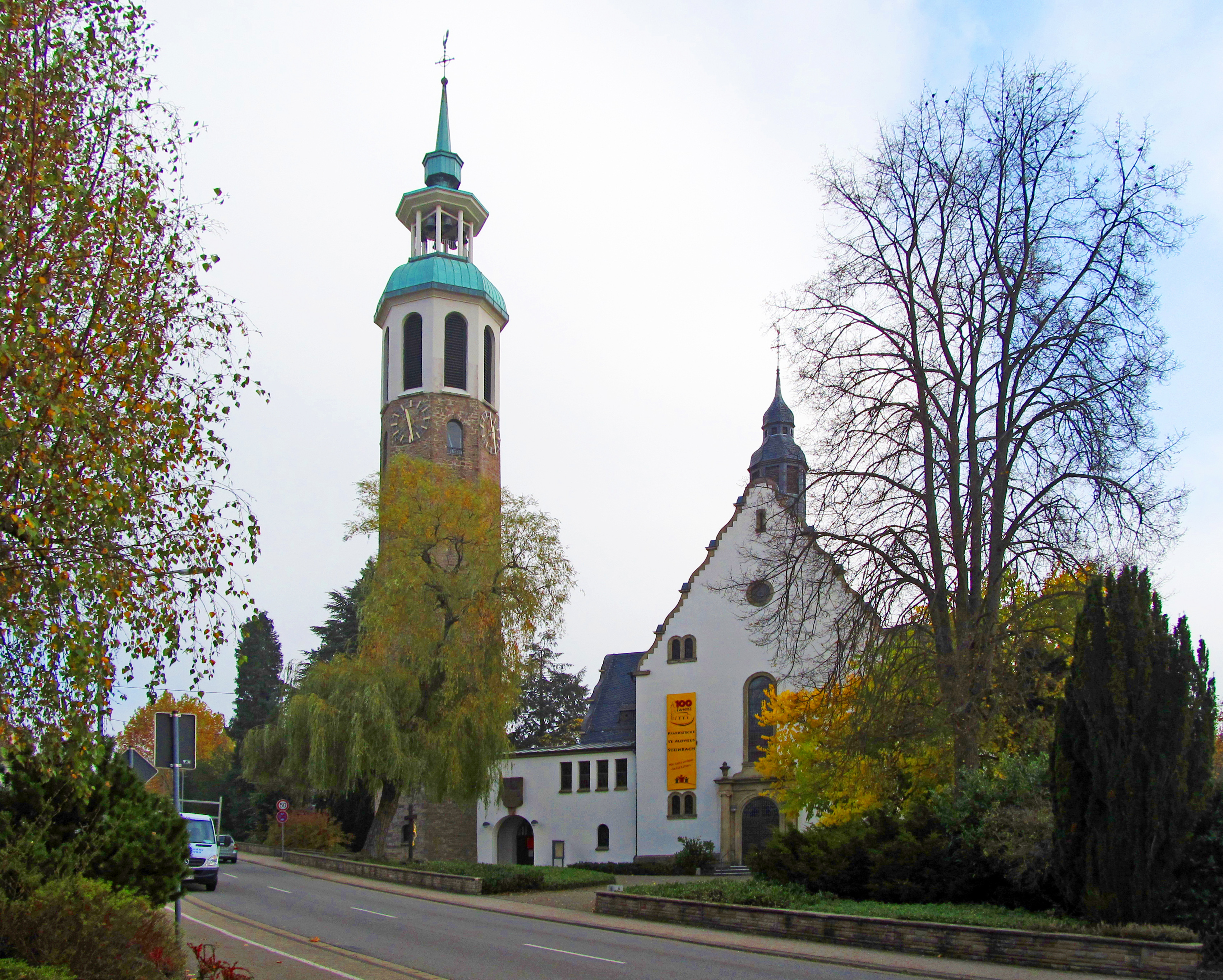 Die katholische Pfarrkirche St. Aloysius in Steinbach, einem Stadtteil von Lebach, Saarland